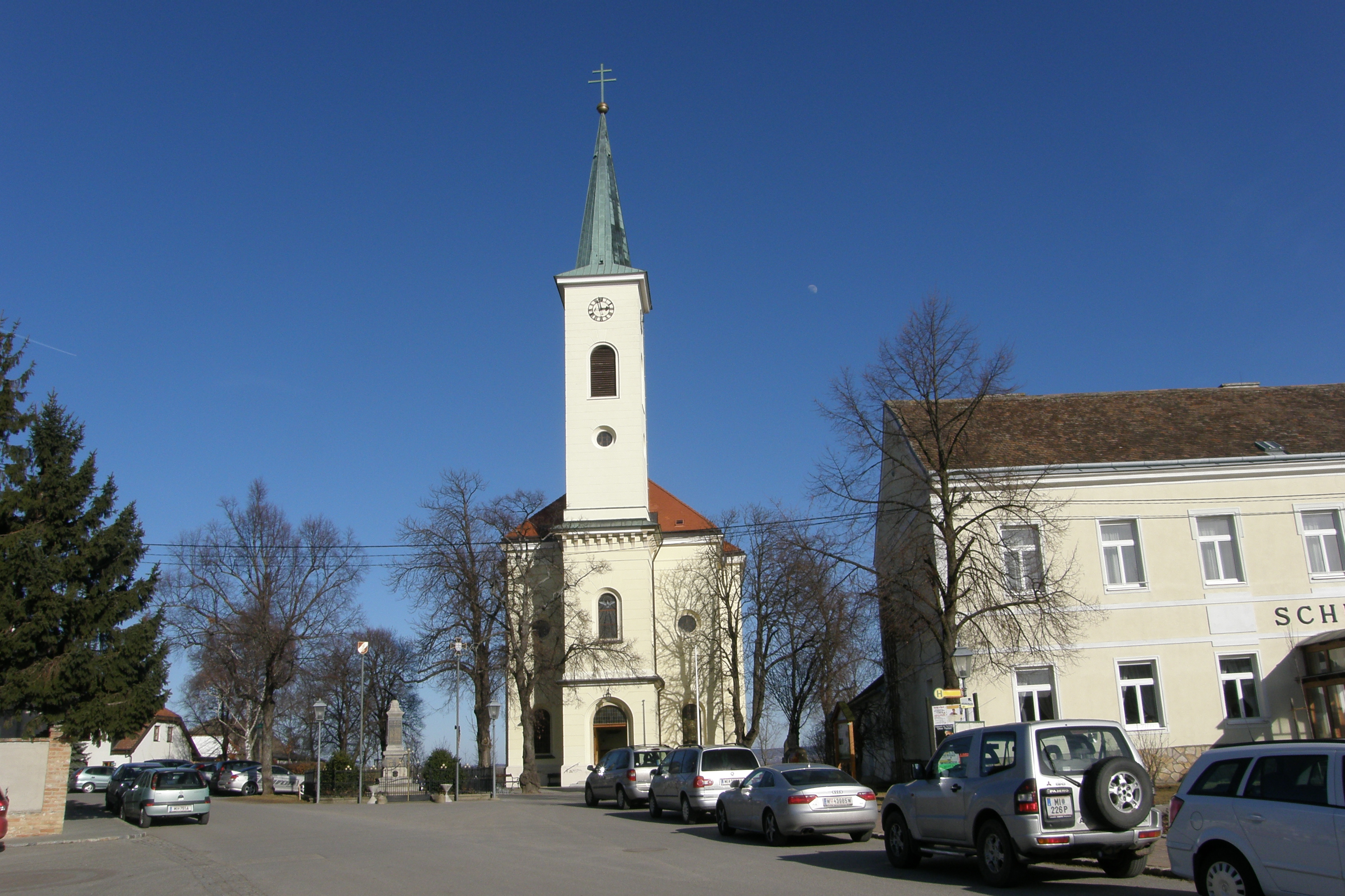 Kath. Pfarrkirche hl. Florian